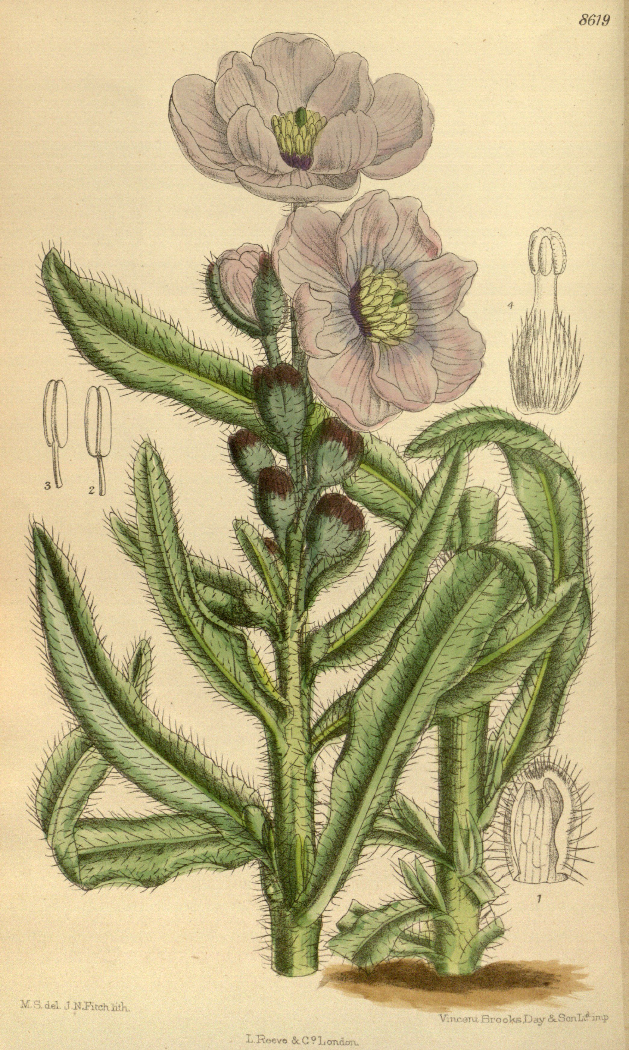 Meconopsis prattii, Papaveraceae